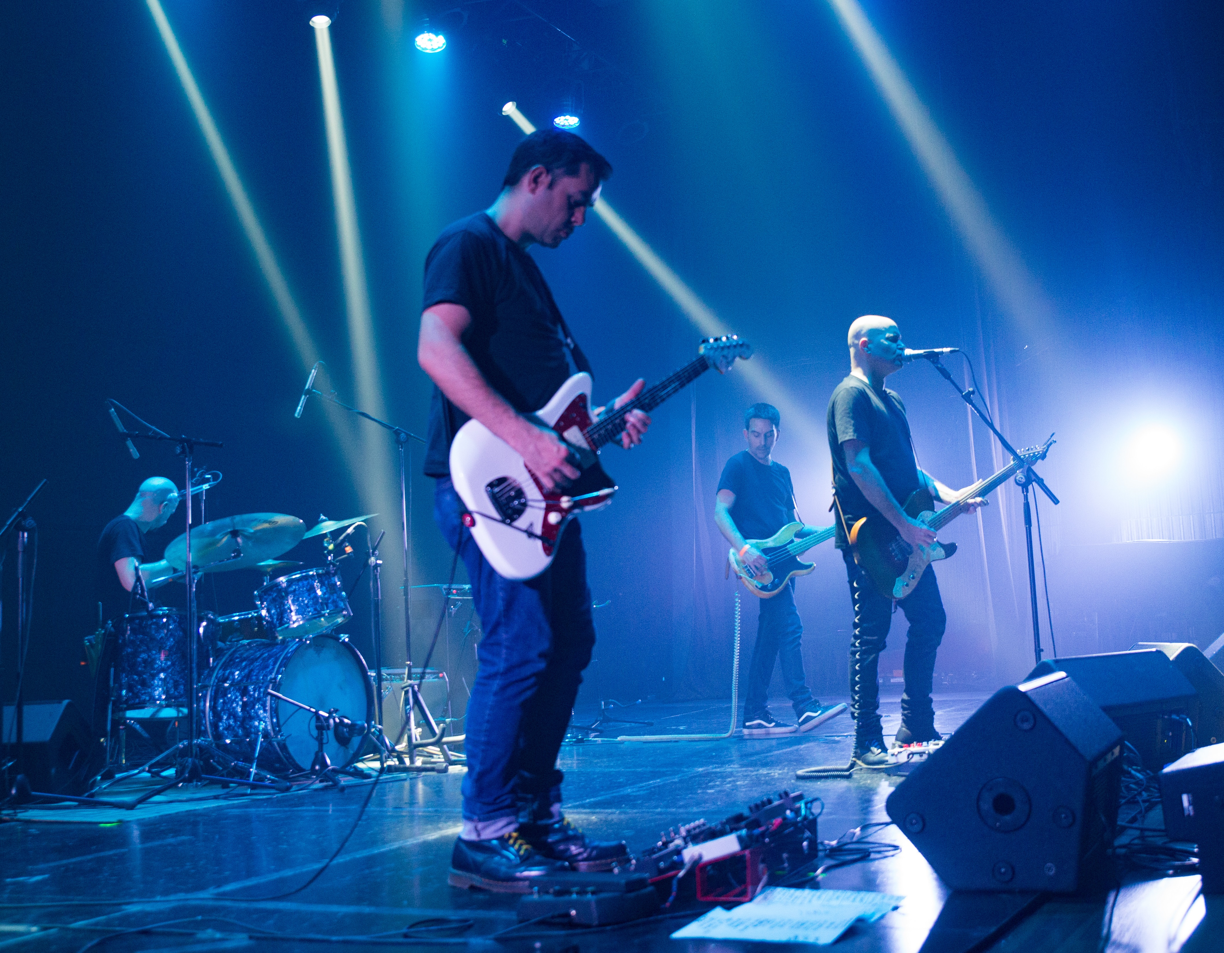 Valle de Muñecas en Caras y Caretas - octubre de 2018